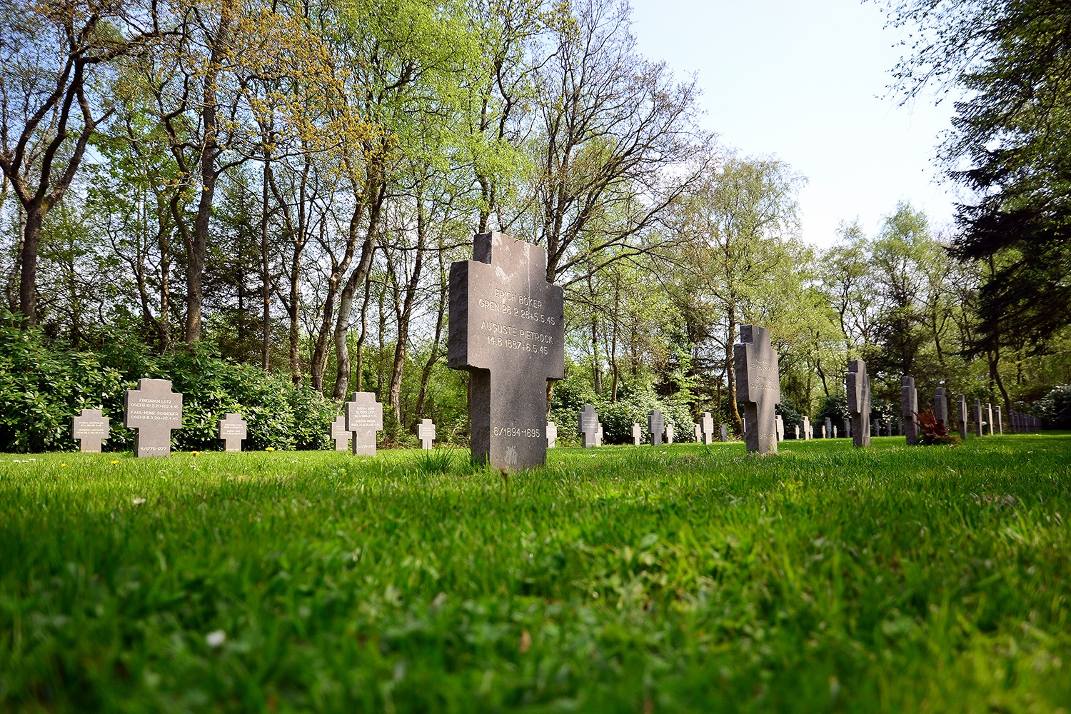 Oksbøl, Dänemark, Datum/Uhrzeit: 19.05.2013 13:04:20